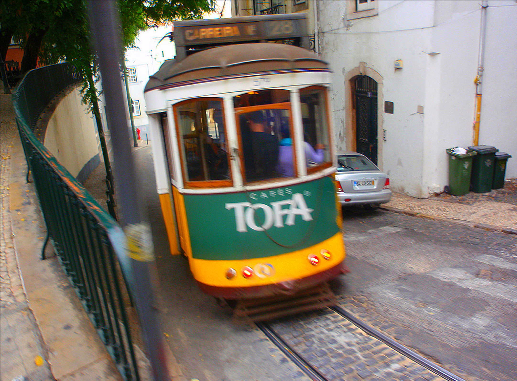 Lisboa (Portugal)